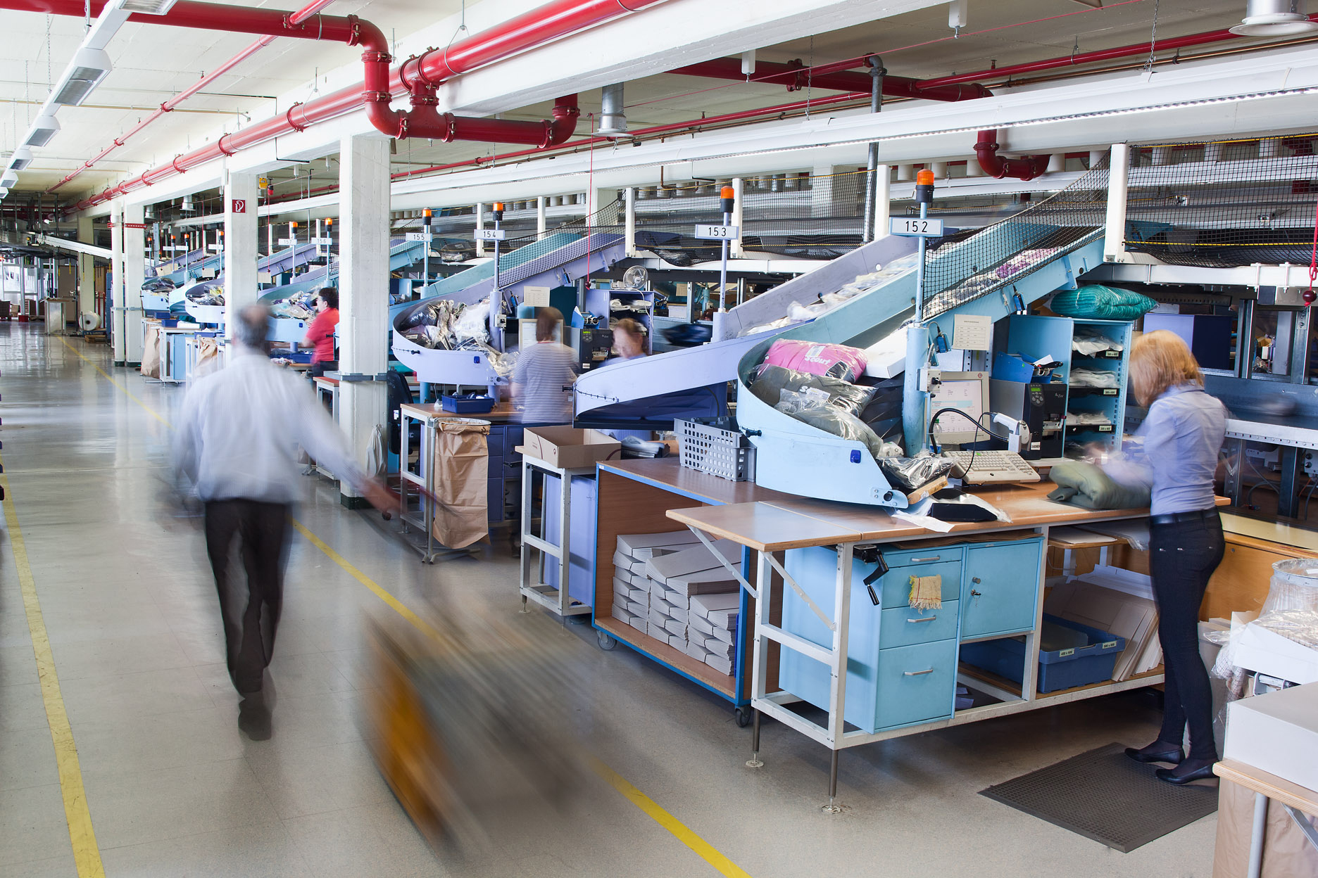 Retourenbetrieb der Hermes Fulfilment GmbH, Hamburg